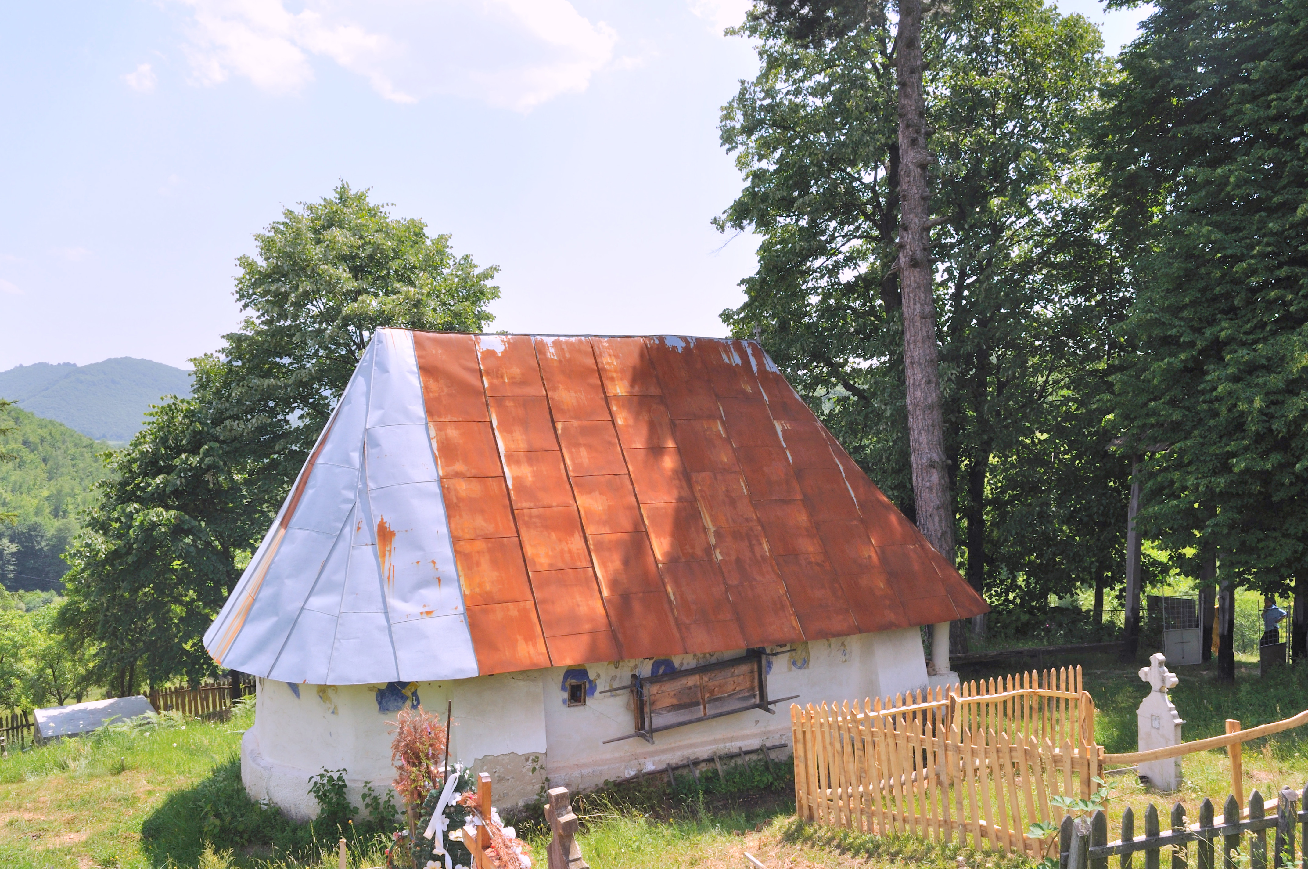 Biserica de lemn „Sfântul Gheorghe”, sat Turtaba, județ Mehedinți